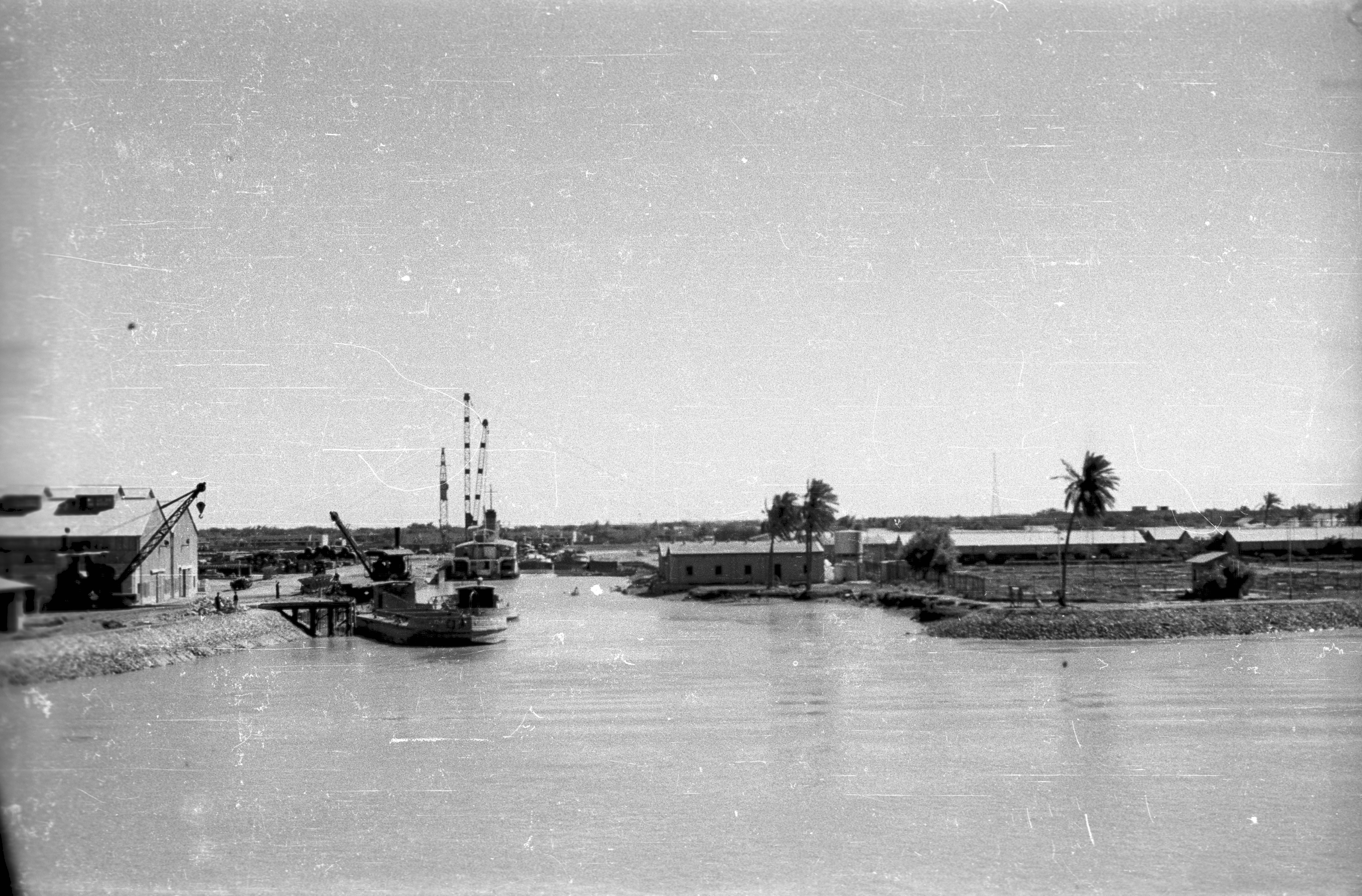 Fra havnen i Abadan. Fra en serie med fotografier i albumet: "Istanbul-Iran-Irak-India-Ceylon" Abadan havn, Abadan, Iran